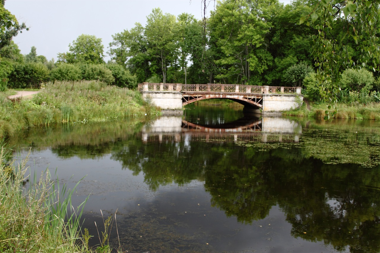 Запруда на реке Кузьминка в Александровском парке